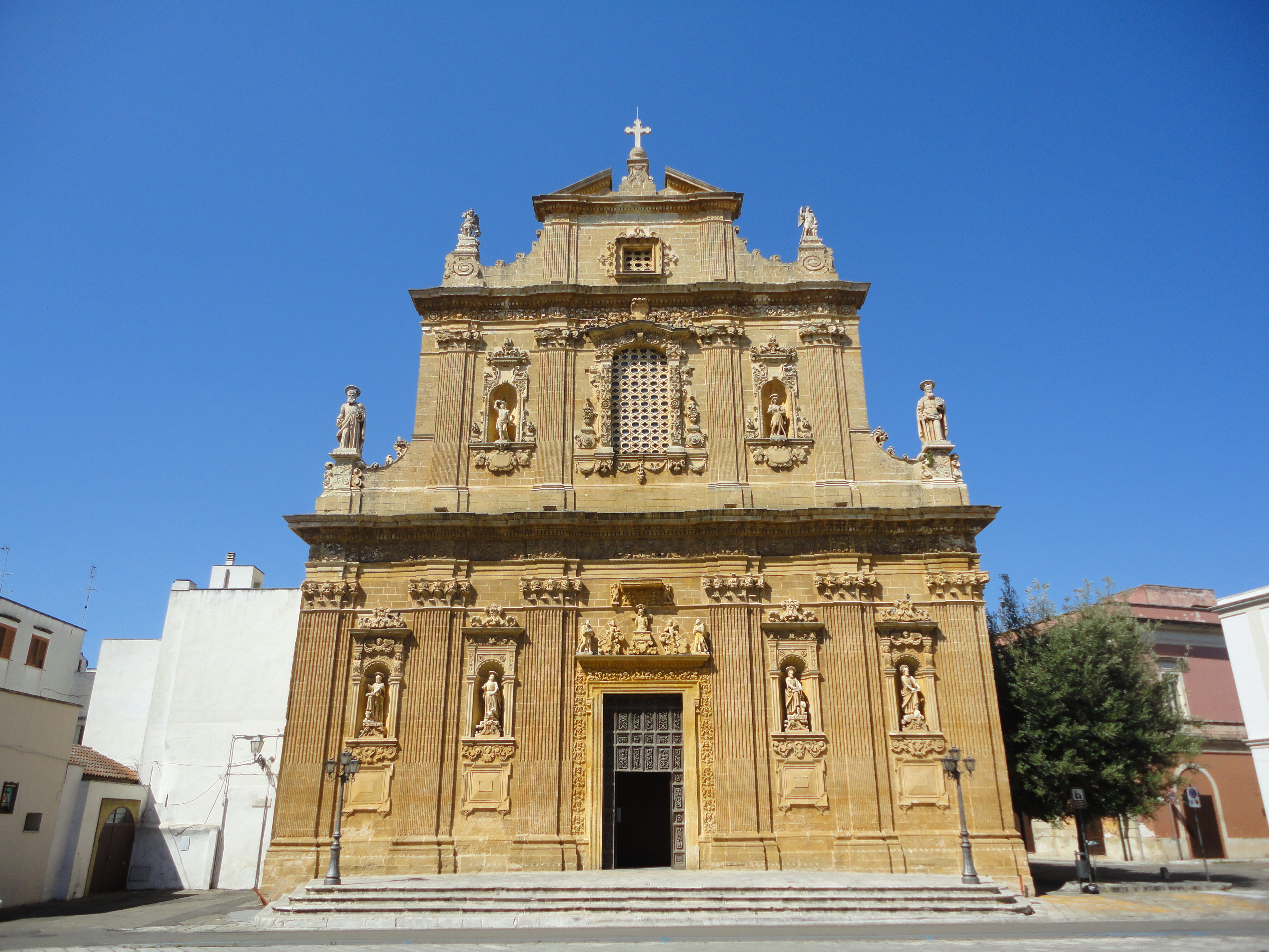 Santuario del Santissimo Crocifisso Galatone, Lecce